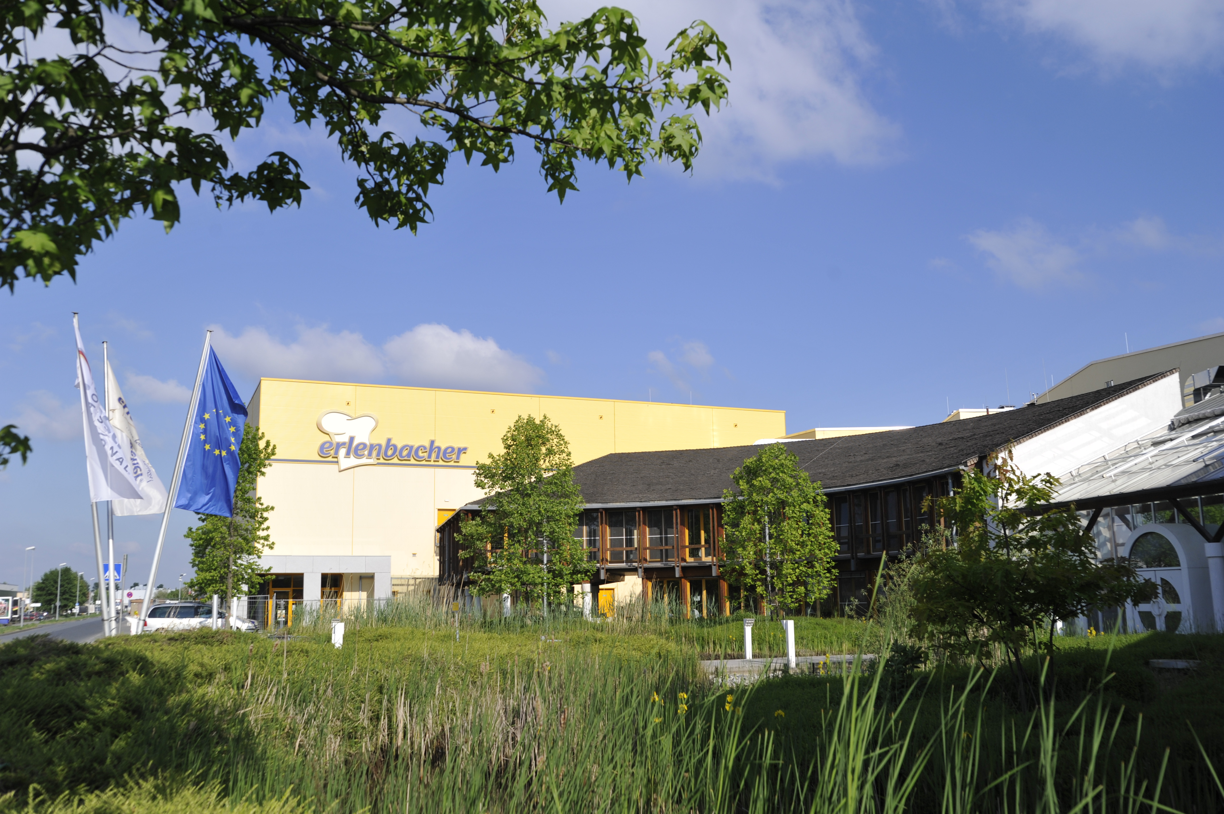 Produzent von Tiefkühl-Kuchen, -Torten und -Desserts für den Gastro-Profi.